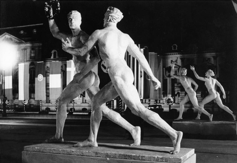 Berlin Olympiade 1936 - Pariser Platz